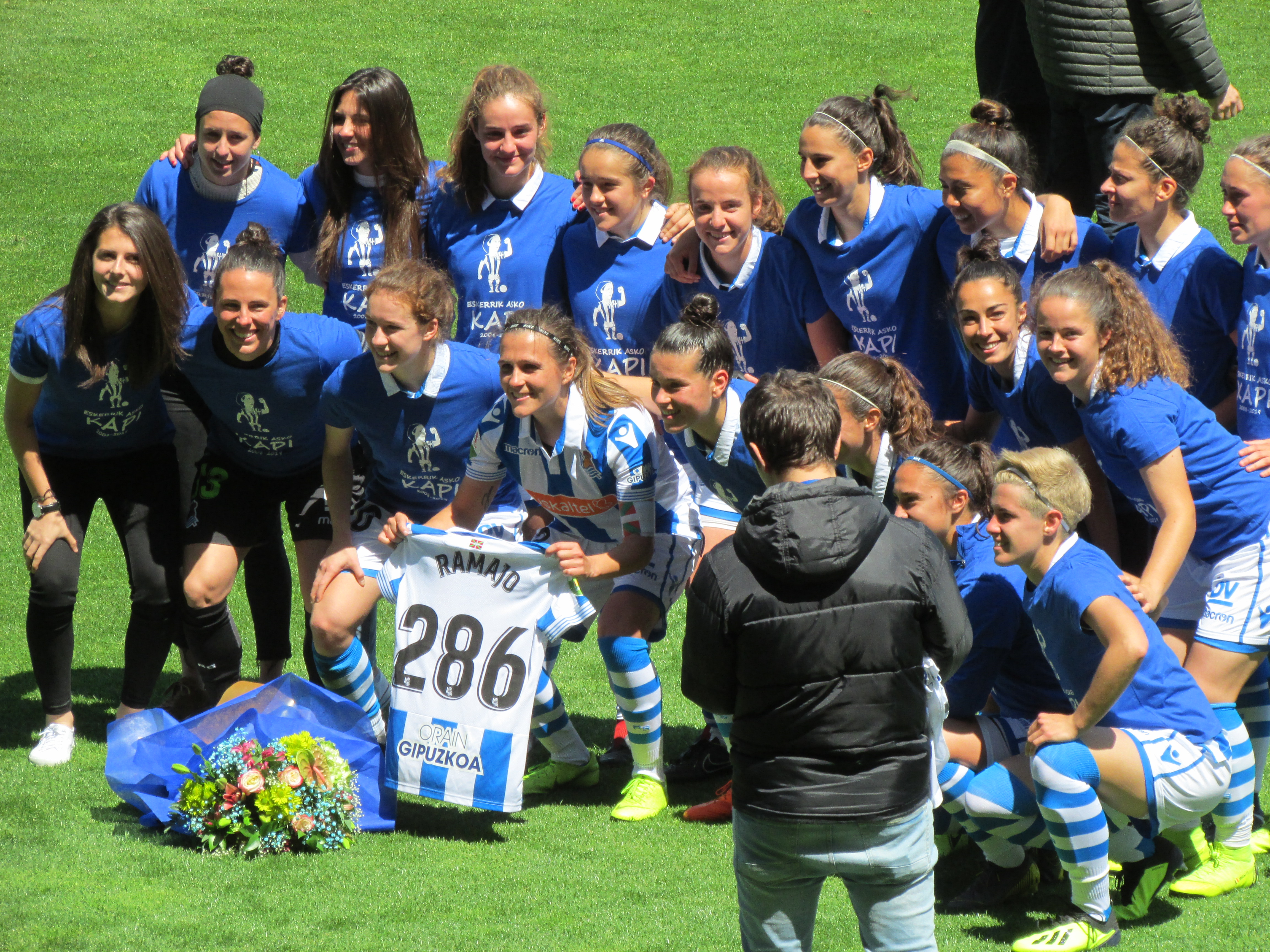 Sandra Ramajo despedida y camiseta. último partido de sandra ramajo